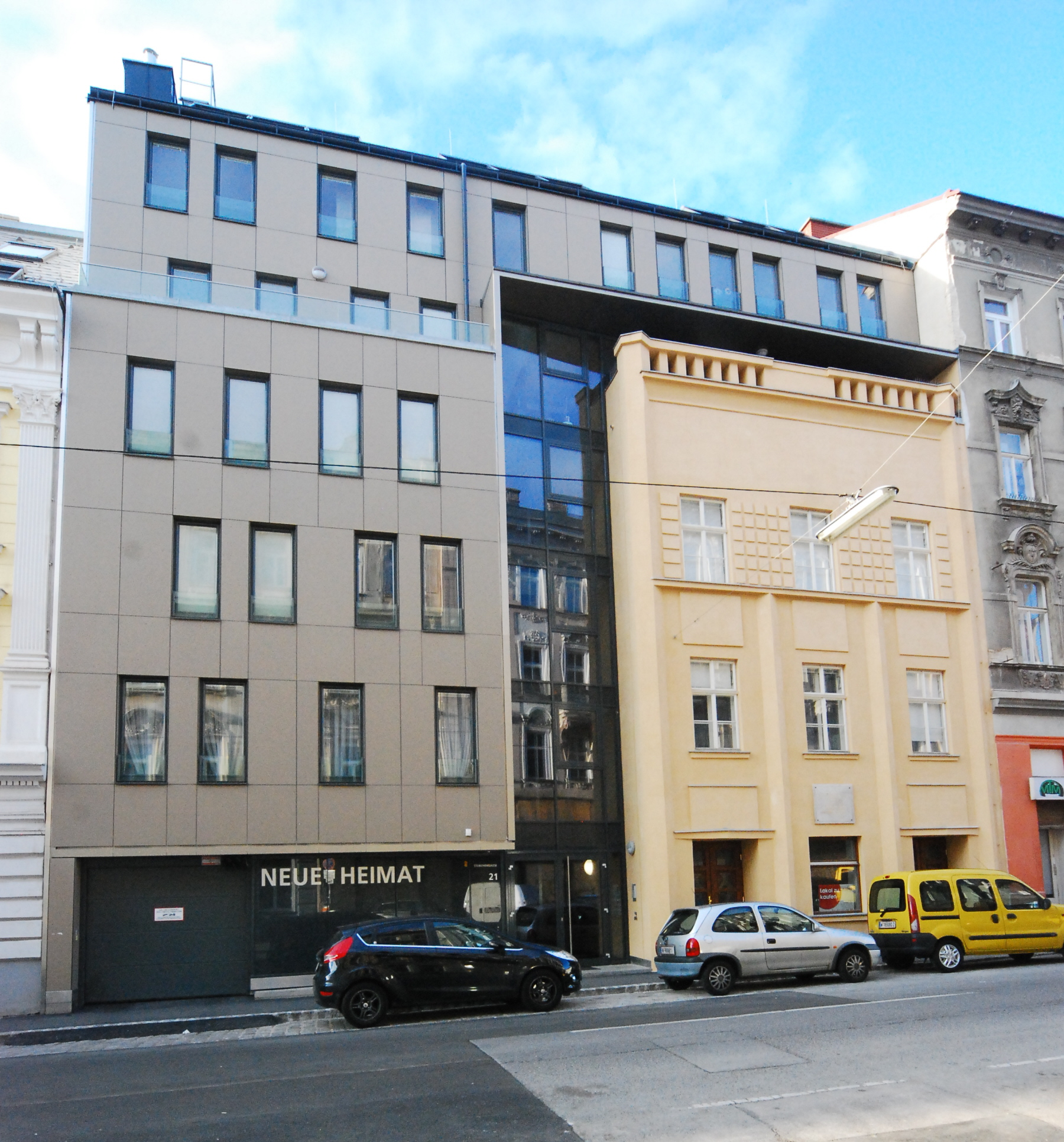 Wohnhaus, ehem. Storchentempel (rechter Gebäudeteil)